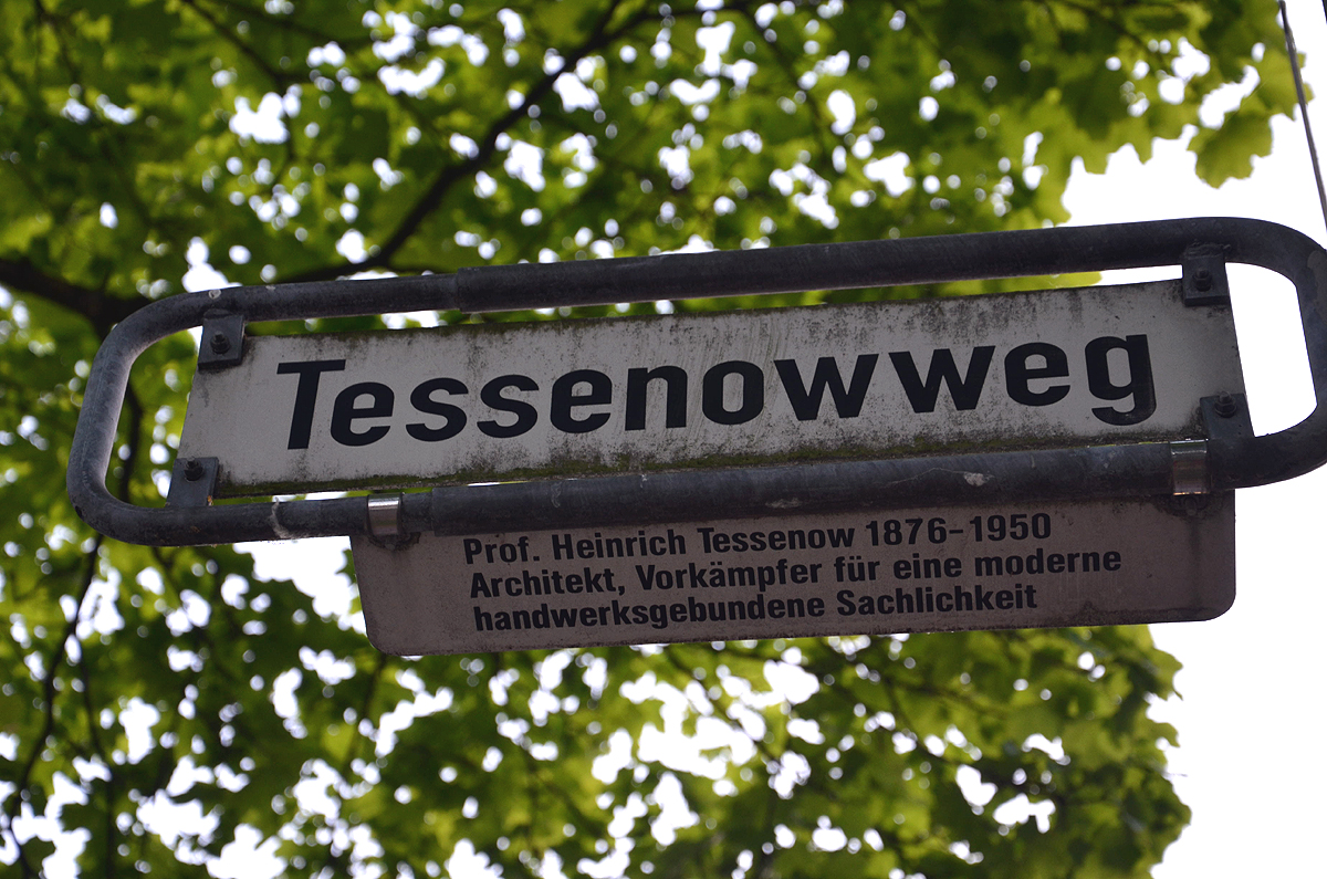 Die Legende am Straßenschild Tessenowweg in Hannover dokumentiert: „Prof. Heinrich Tessenow 1876-1950, Architekt, Vorkämpfer für eine moderne handwerksgebundene Sachlichkeit“ ...